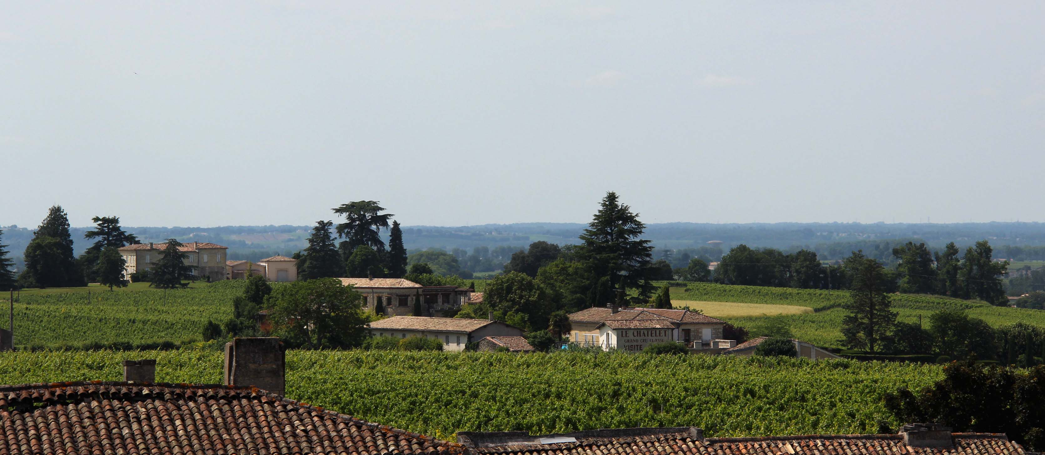 Château de Saint-Émilion 04